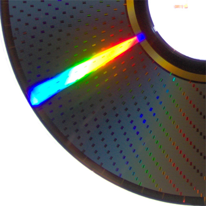 DVD-RAM-Unterseite im Detail - zur Veranschaulichung der Sektorierung (visualisation of the small rectangles on the bottom side of a DVD-RAM)